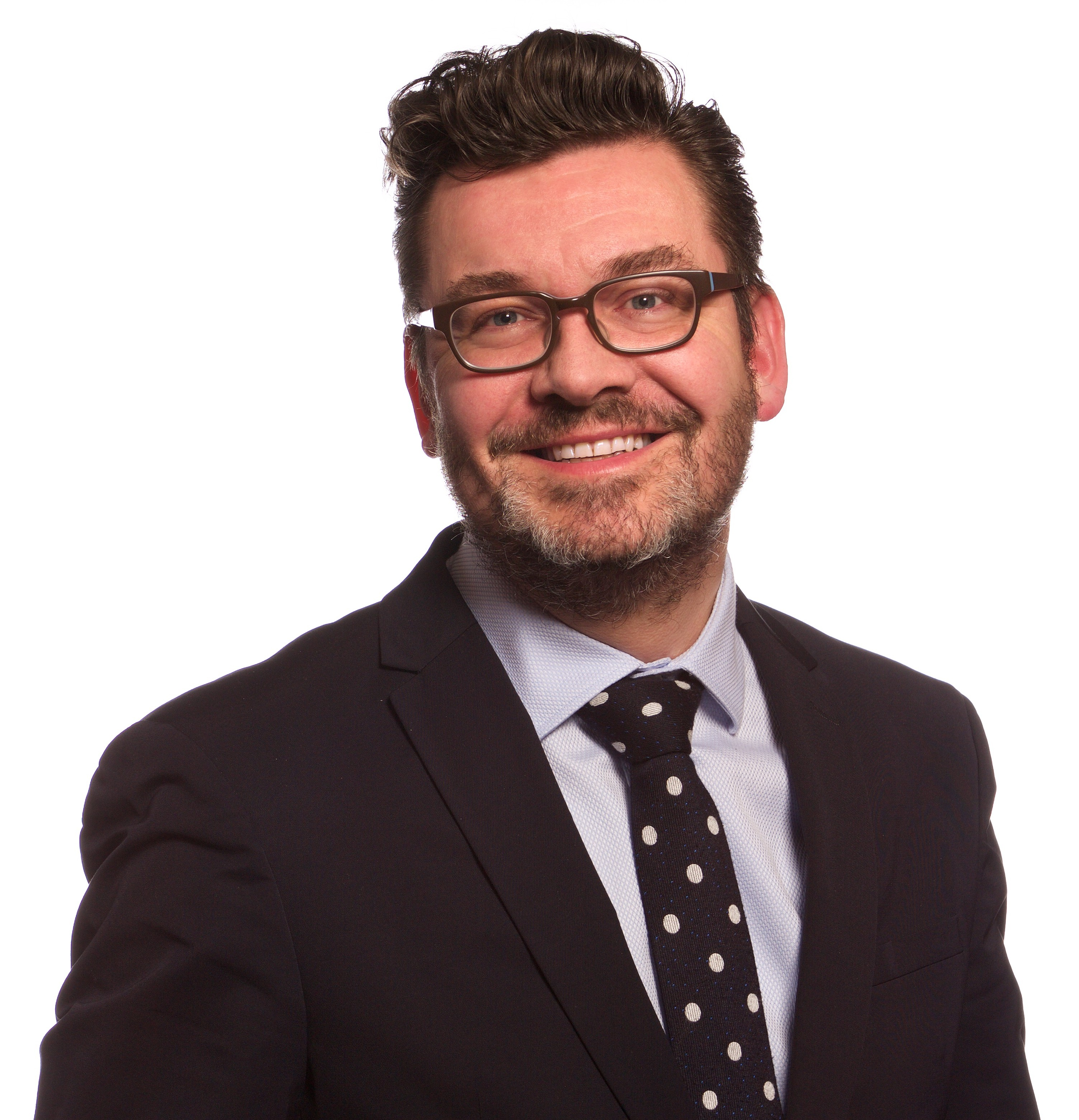 Kandidaten Provinciale staten D66 Utrecht